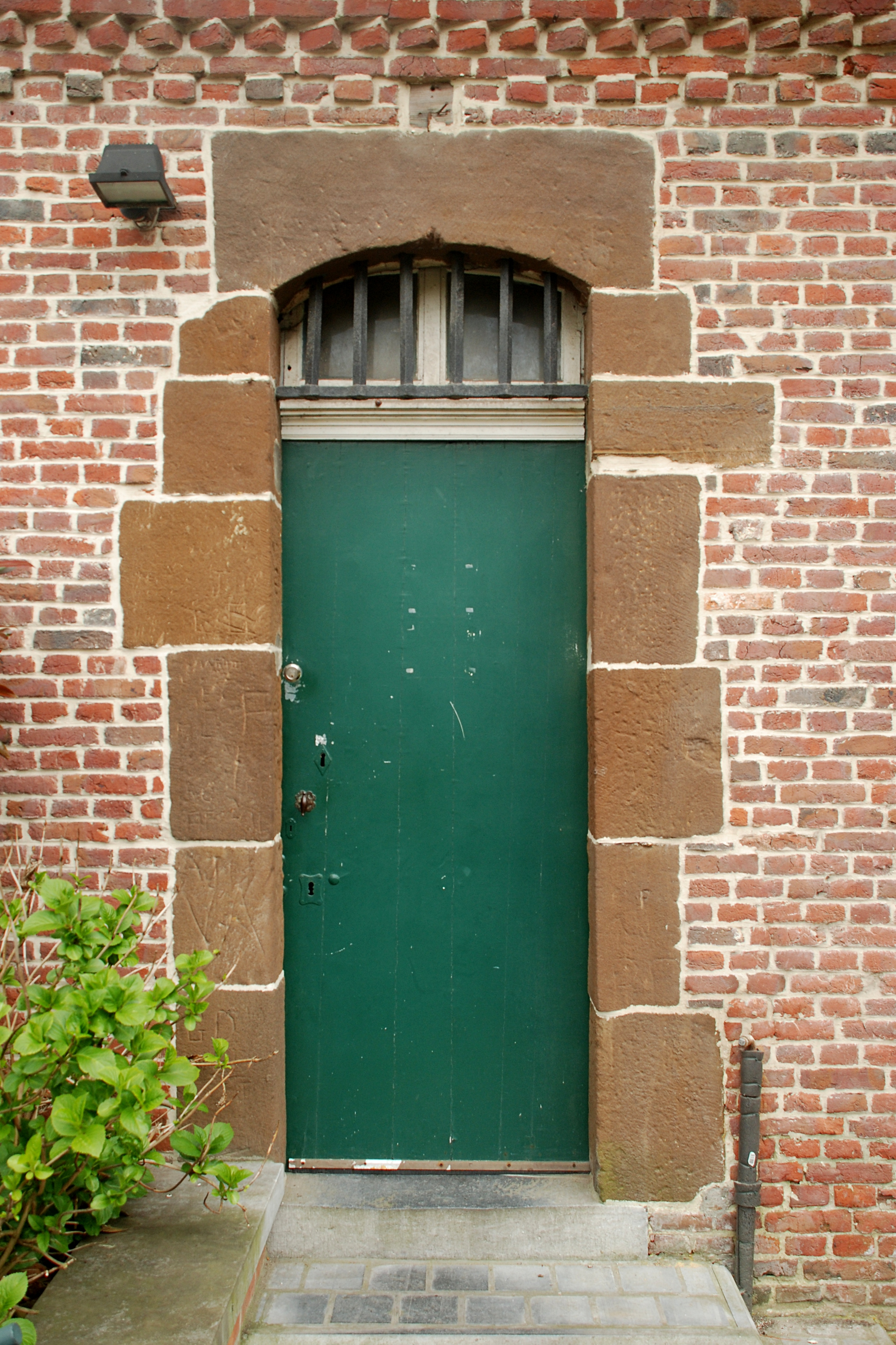 Belgique - Église Saint-Rémi d'Ottignies